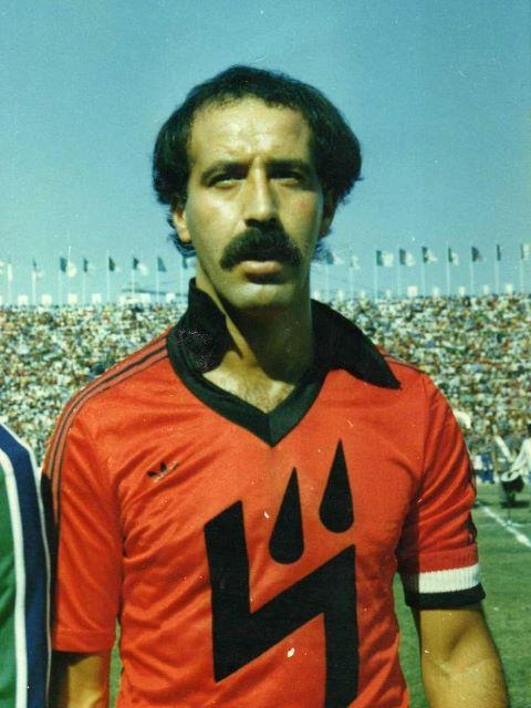 Djamel Keddou, capitaine de l'USK Alger, à l'occasion de la finale de la Coupe d'Algérie 1980-1981 remportée 2-1 face à l'ASC Oran à Sidi Bel Abbès.